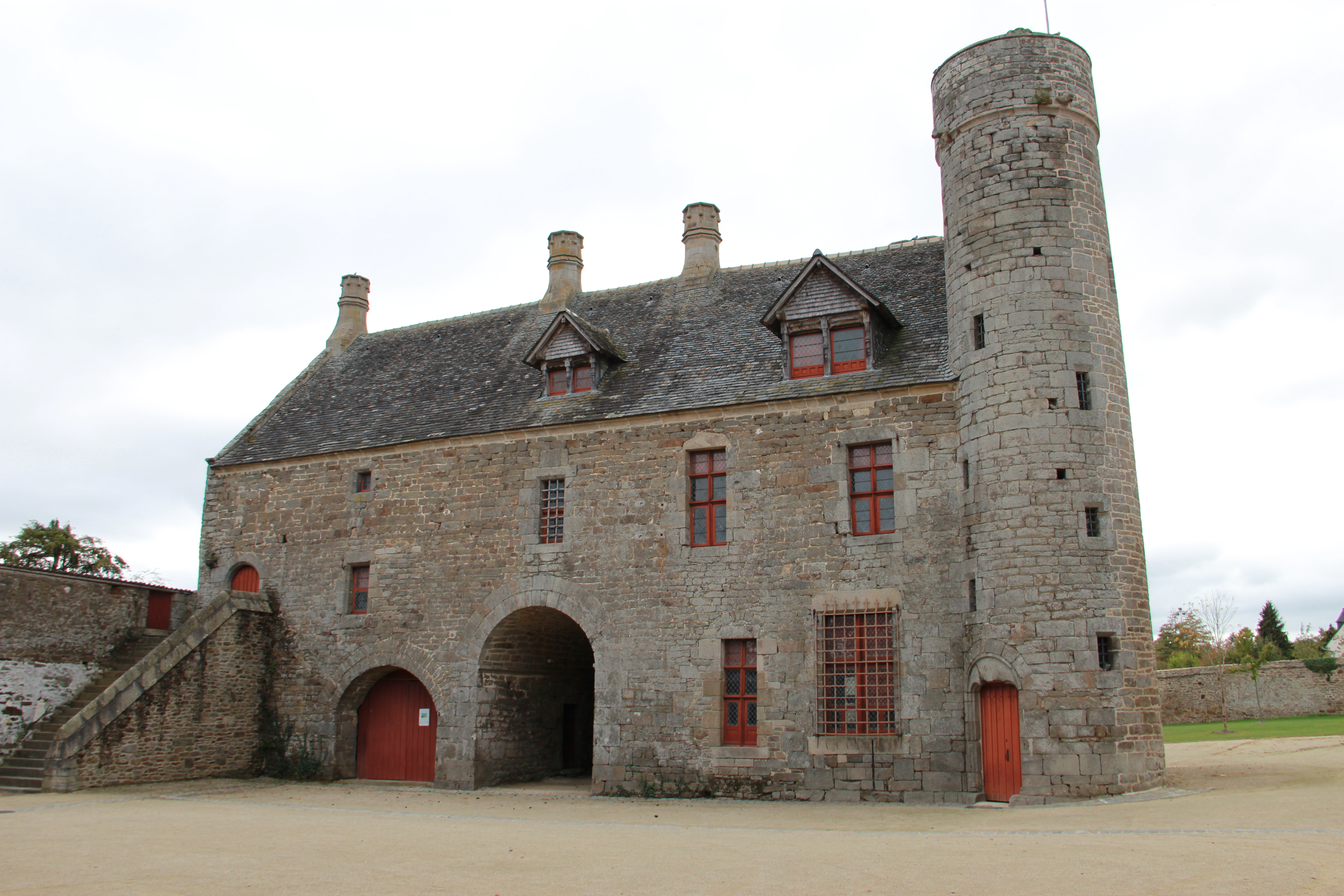 Manoir de la Grand'Cour à Taden. Ce superbe édifice du XIVème siècle a été le siège de la Seigneurie de Taden.